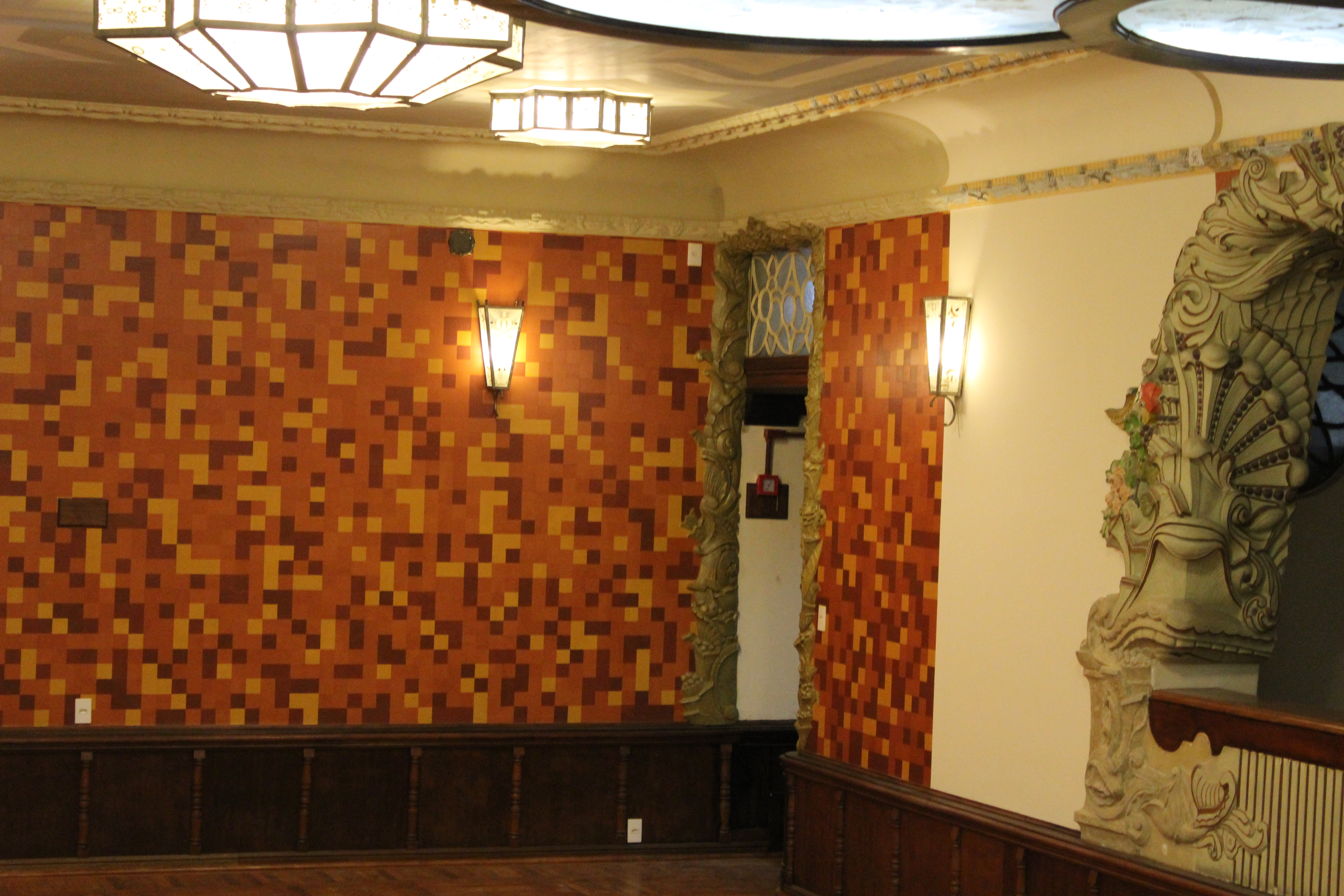 Visão geral do anfiteatro no subsolo da Casa de Nhonhô Magalhães, localizada no bairro de Higienópolis, em São Paulo, Brasil. O local tinha capacidade para quase 50 pessoas sentadas.